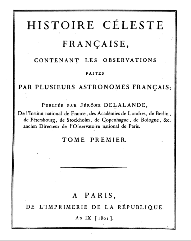 Título Histoire céleste française, Volumen 1 Histoire céleste française, Joseph Jérôme Le Français de Lalande Autor Joseph Jérôme Le Français de Lalande Editor Imprimerie de la république, 1801 Procedencia del original Princeton University Digitalizado 23 Ene 2009 N.º de páginas 590 páginas